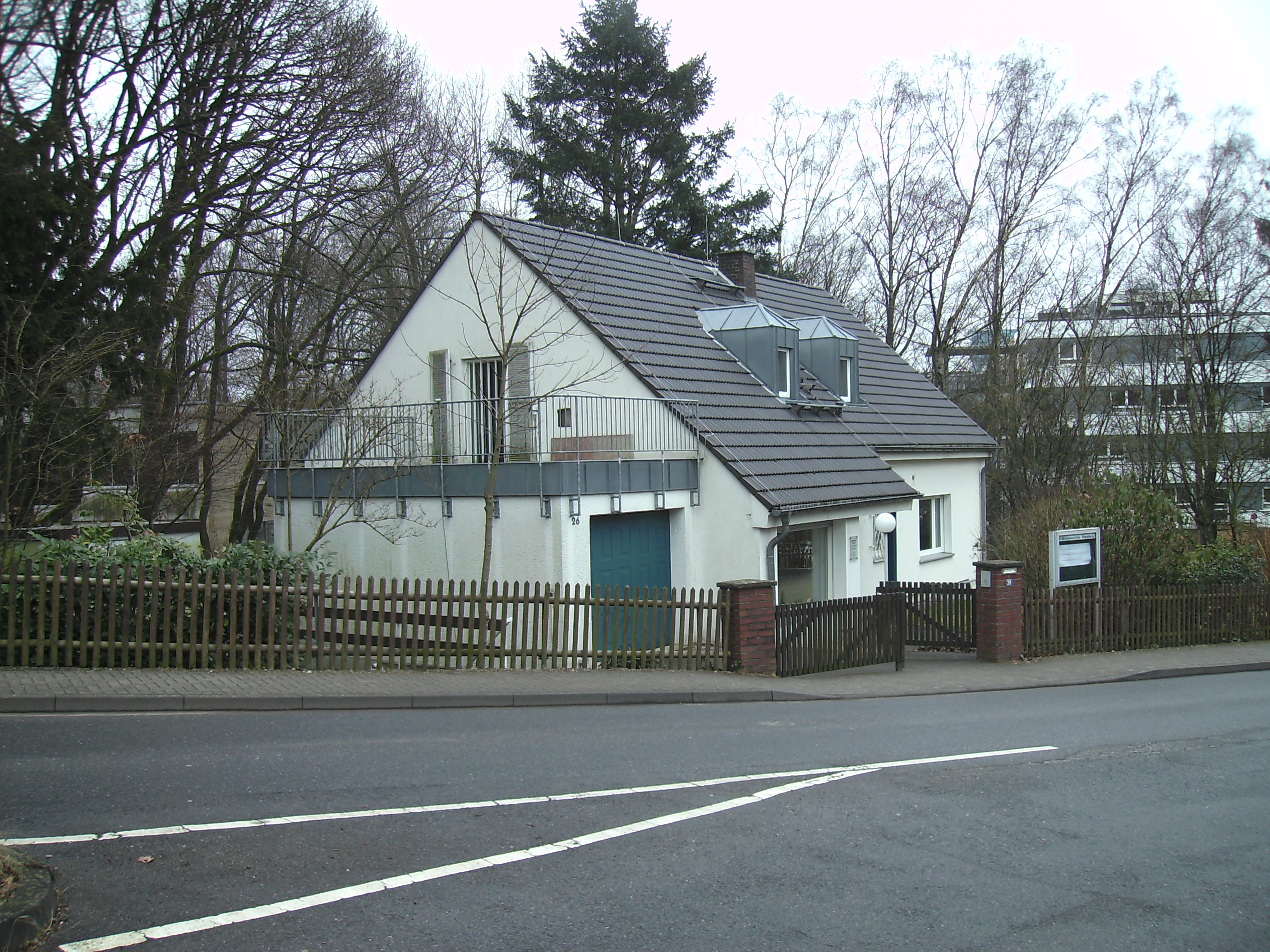 Die Erdbebenstation Bensberg in Bergisch Gladbach (Nordrhein-Westfalen) ist eine Einrichtung der Universität zu Köln.